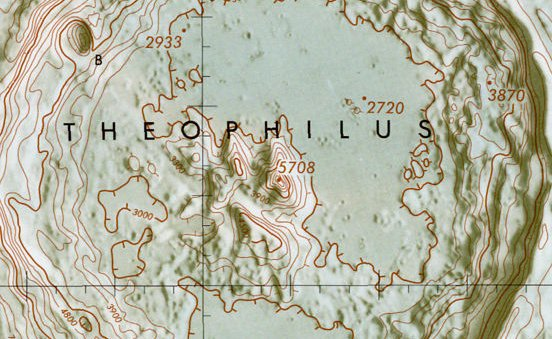 Cráter lunar Theophilus. Mapa topográfico de sus picos centrales. (Lunar Map 1:1.000.000)